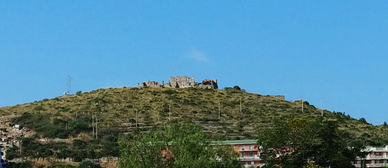 Veduta da nord-est con i resti del convento.